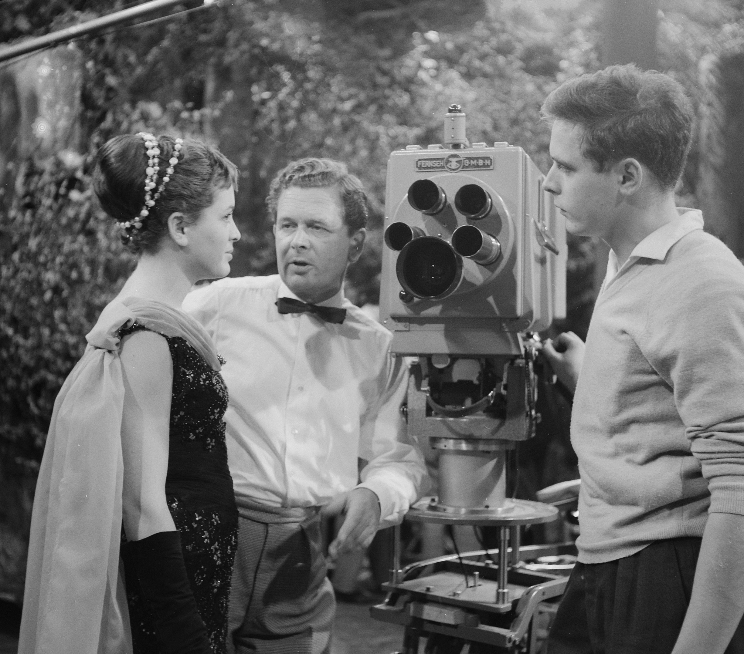 Televisiespel "Leocadia", Ellen van Hemert, Willy van Hemert en Rudy van Hemert